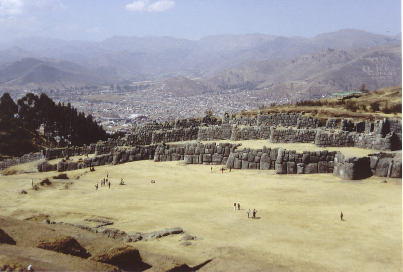 Sacsayhuamán mit Blick auf Cuzco